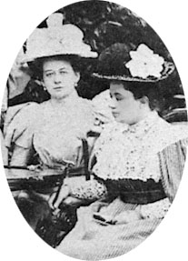 Барятинская Мария Викторовна (княгиня)